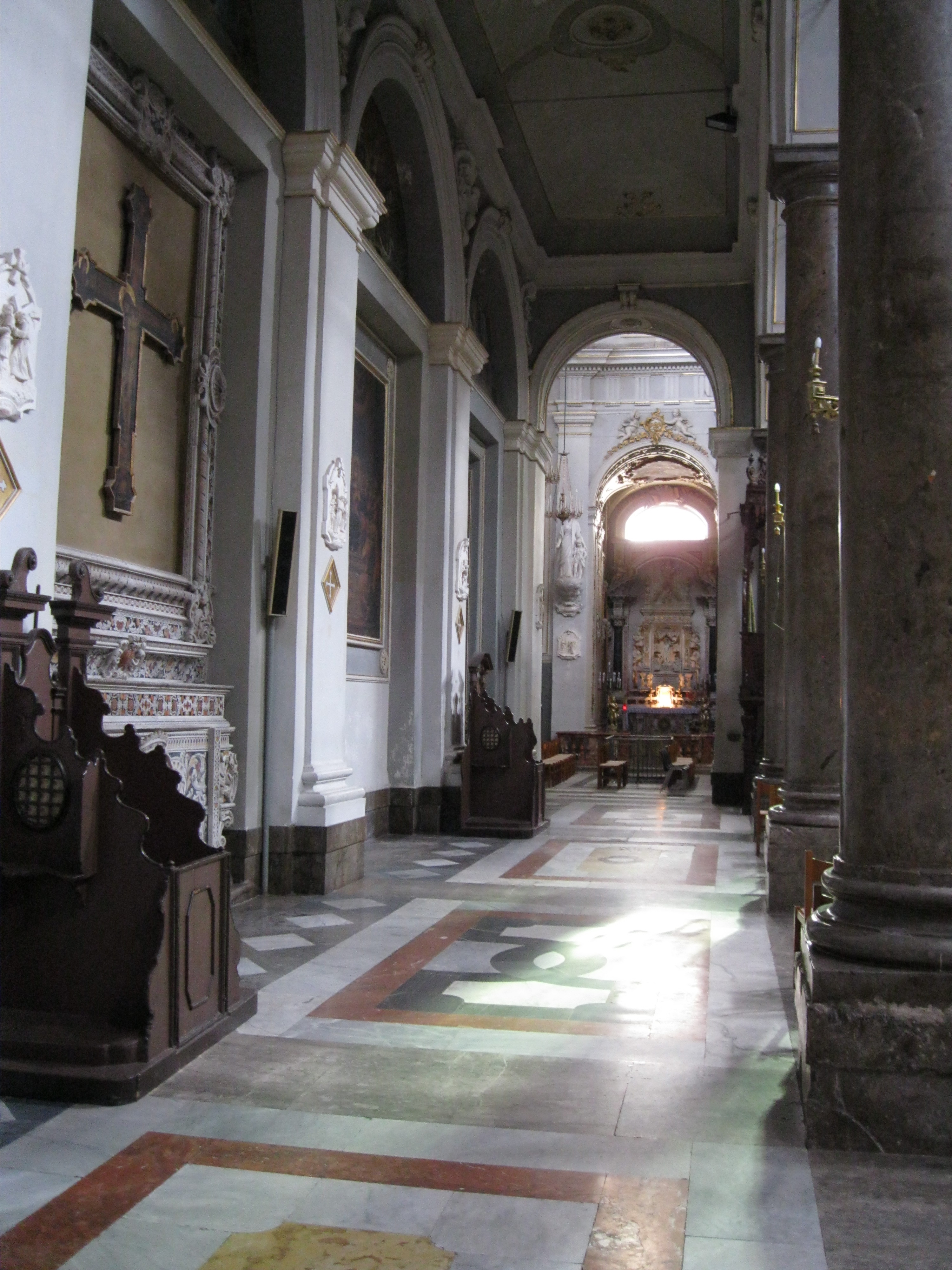 Il duomo di San Giorgio Martire a Caccamo, nella città metropolitana di Palermo.